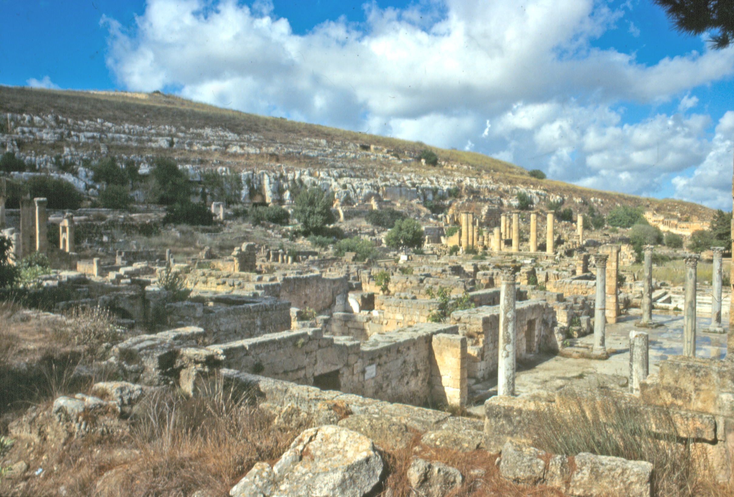 Libia, Cirene (sito archeologico), santuario di Apollo